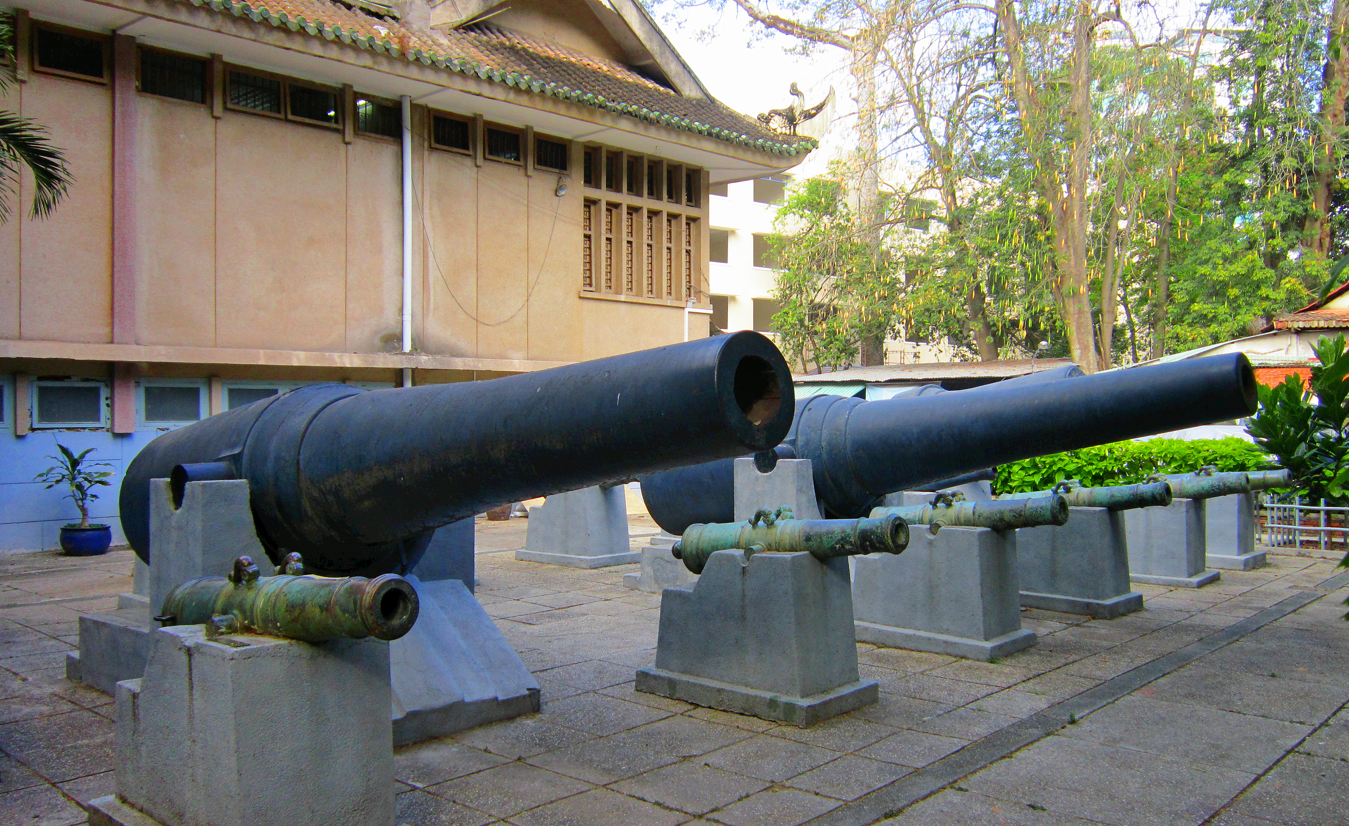 Những khẩu đại bác nhỏ nhoi mang cùng một tên “Thần uy tướng quân” của quân đội Việt, được đúc vào năm 1817 (thời Gia Long), được dùng để chống lại đại bác của quân đội Pháp to gấp nhiều lần, được đúc vào năm 1868 (thời Tự Đức, cũng chính là năm Nguyễn Trung Trực thọ tử). Ảnh chụp tại Viện Bảo tàng Lịch sử TP. HCM, vào ngày 21 tháng 4 năm 2008.